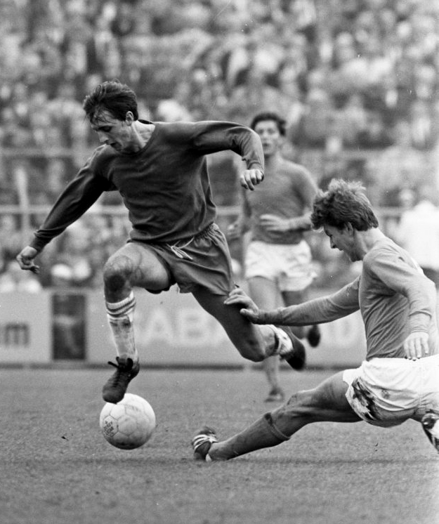 Ajax-Volendam 2-0 Johan Cruyff in duel met J. Jonk (rechts)